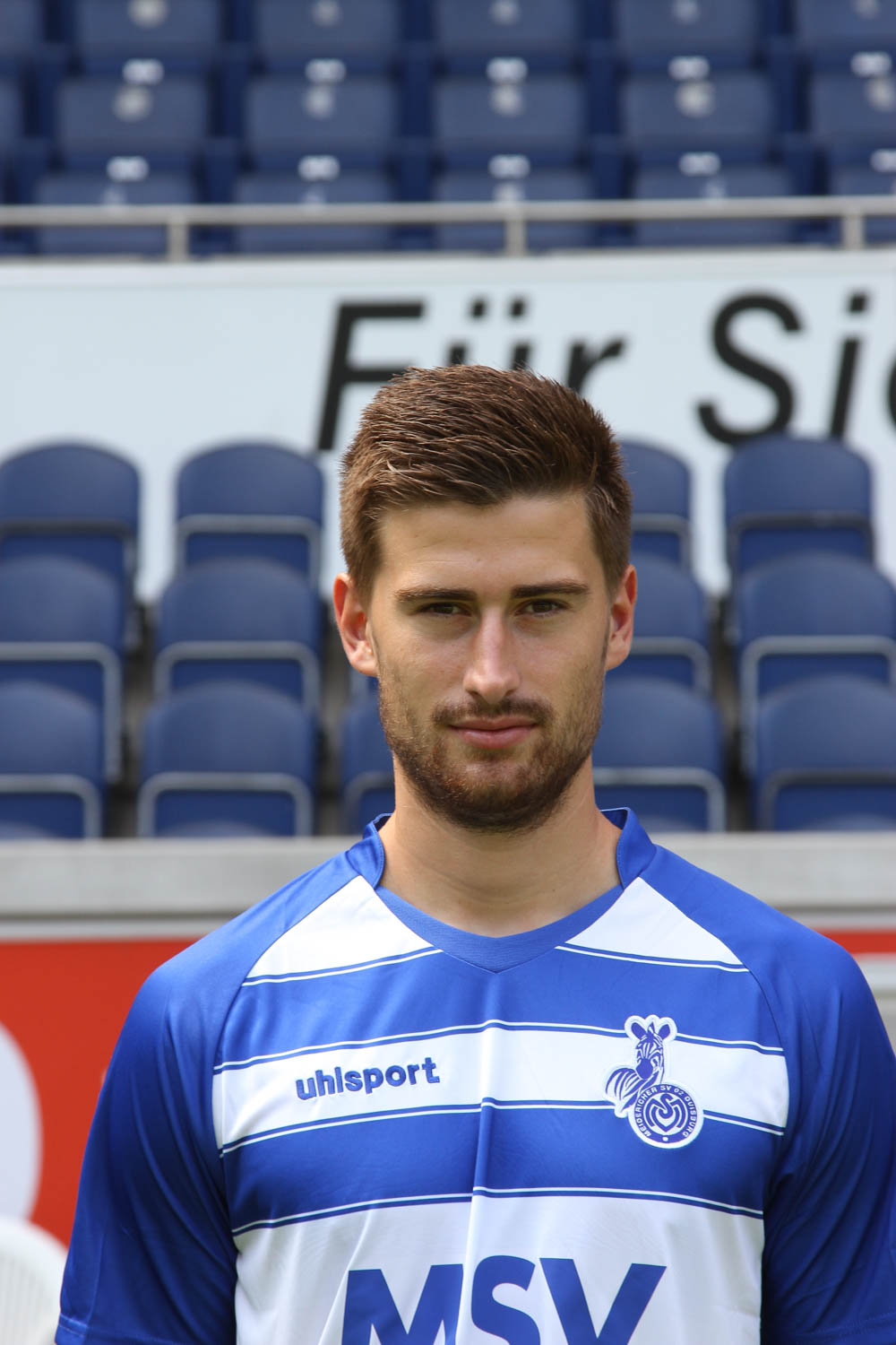 Dustin Bomheuer 2015